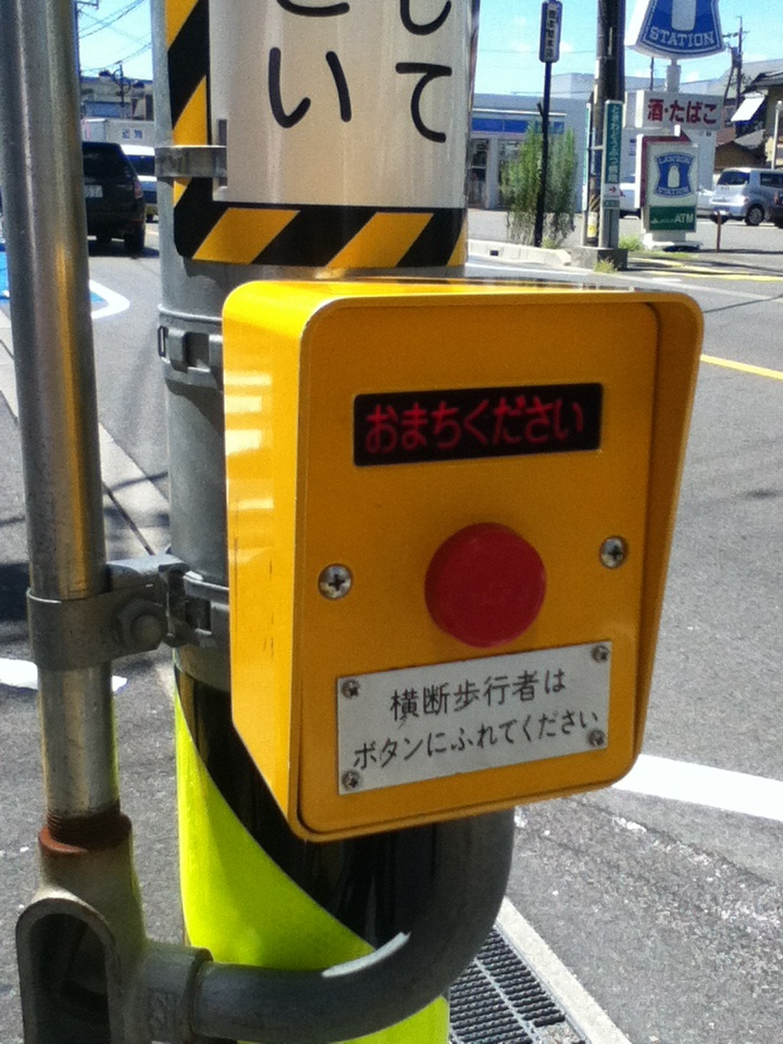 触れるタイプの信号機の押しボタンです。